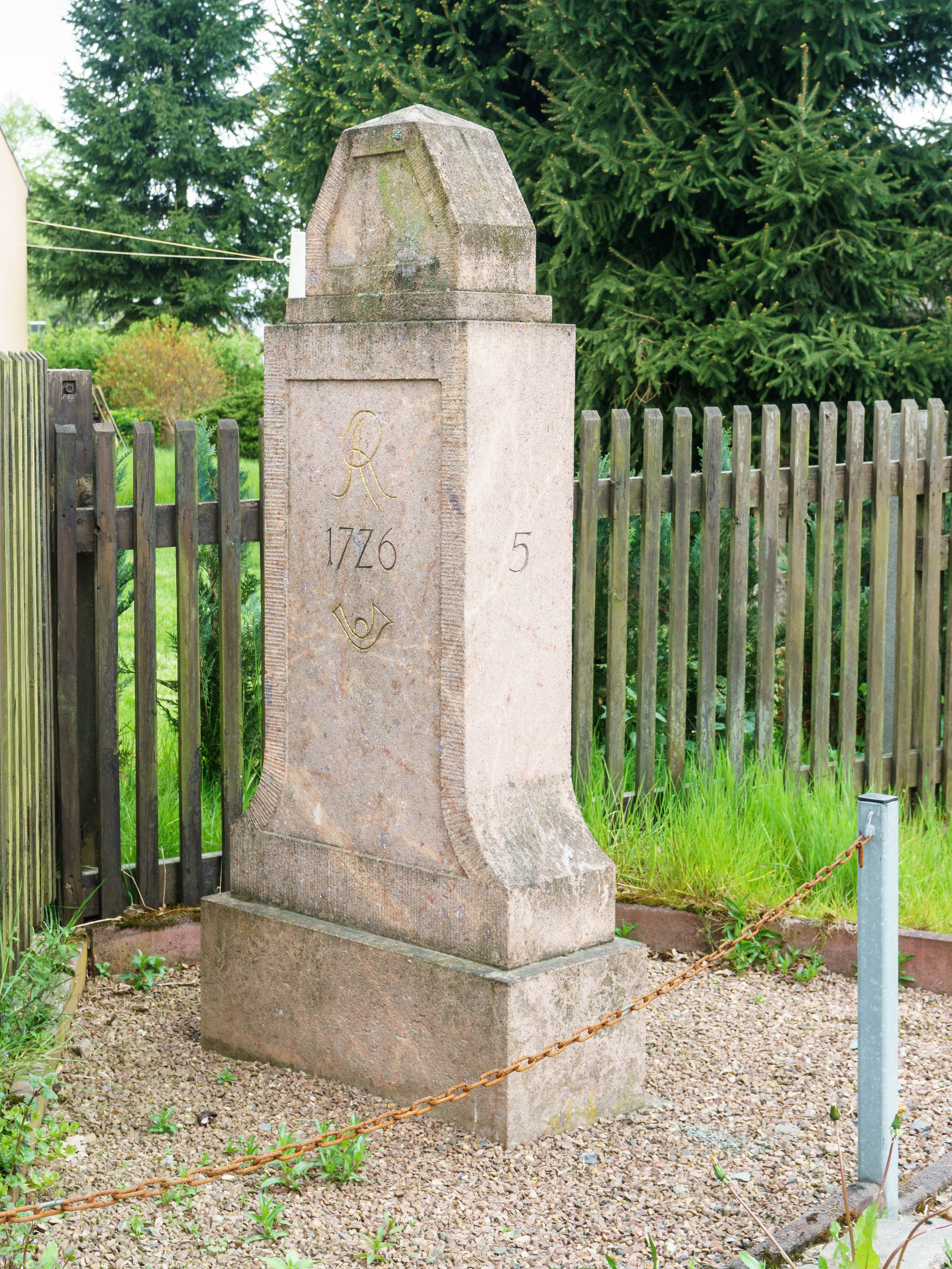 Kursächsischer Viertelmeilenstein Nr. 5, Garnsdorfer Hauptstraße 5 in Lichtenau (Sachsen) OT Garnsdorf Text: AR 1726 Posthorn ; 5